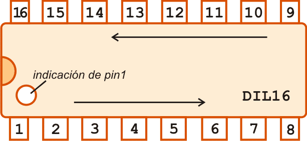 Esquema de encapsulado DIL16, con numeración de pines.